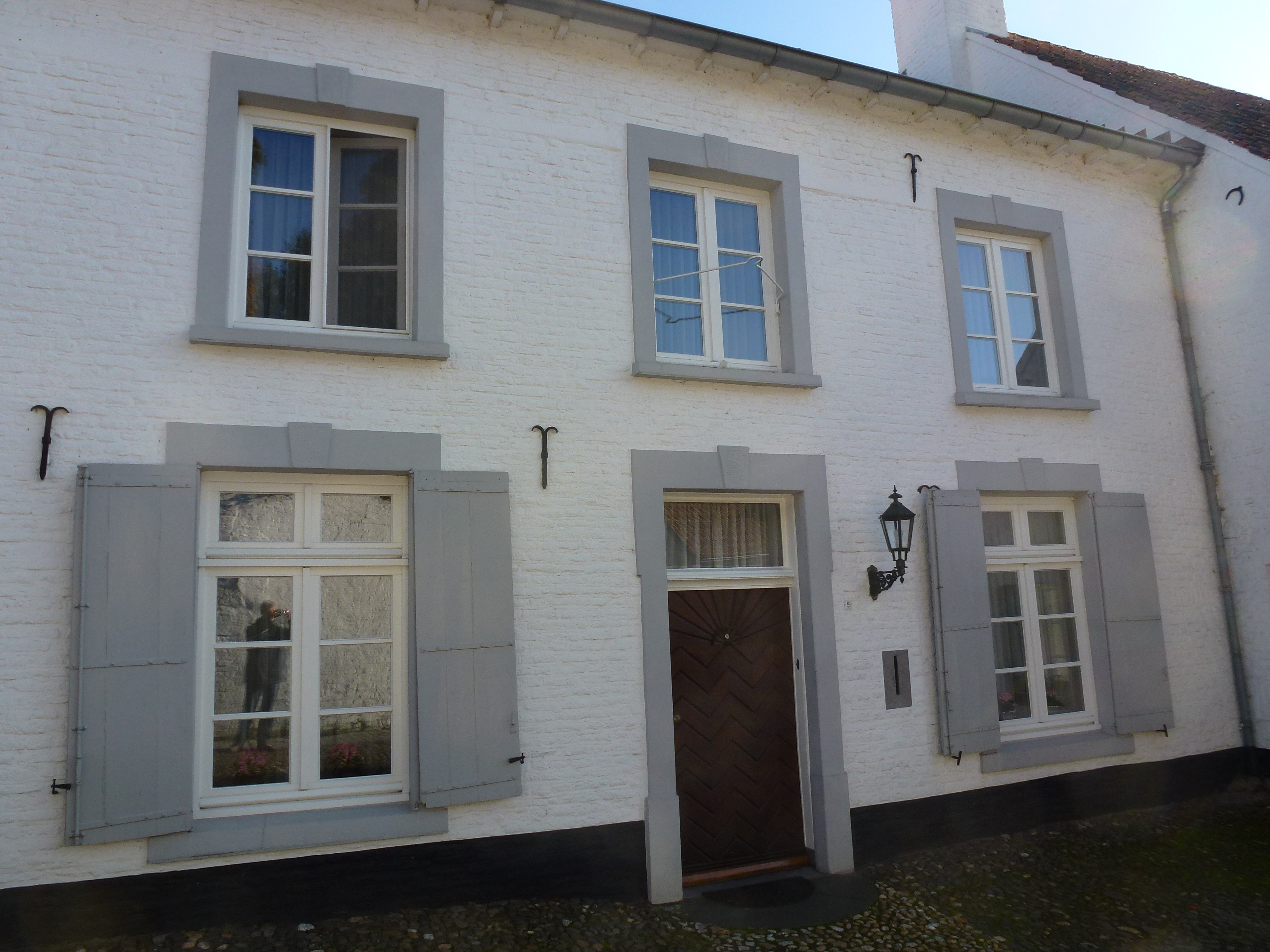 Beekstraat 5 Thorn. Voormalig kanunnikenhuis met zadeldak evenwijdig met de straat met haakse achtervleugel en rechts een vooruitspringend gedeelte eveneens met zadeldak evenwijdig met de straat. Ingangen en vensters in hardsteen XVI-XVIII B.